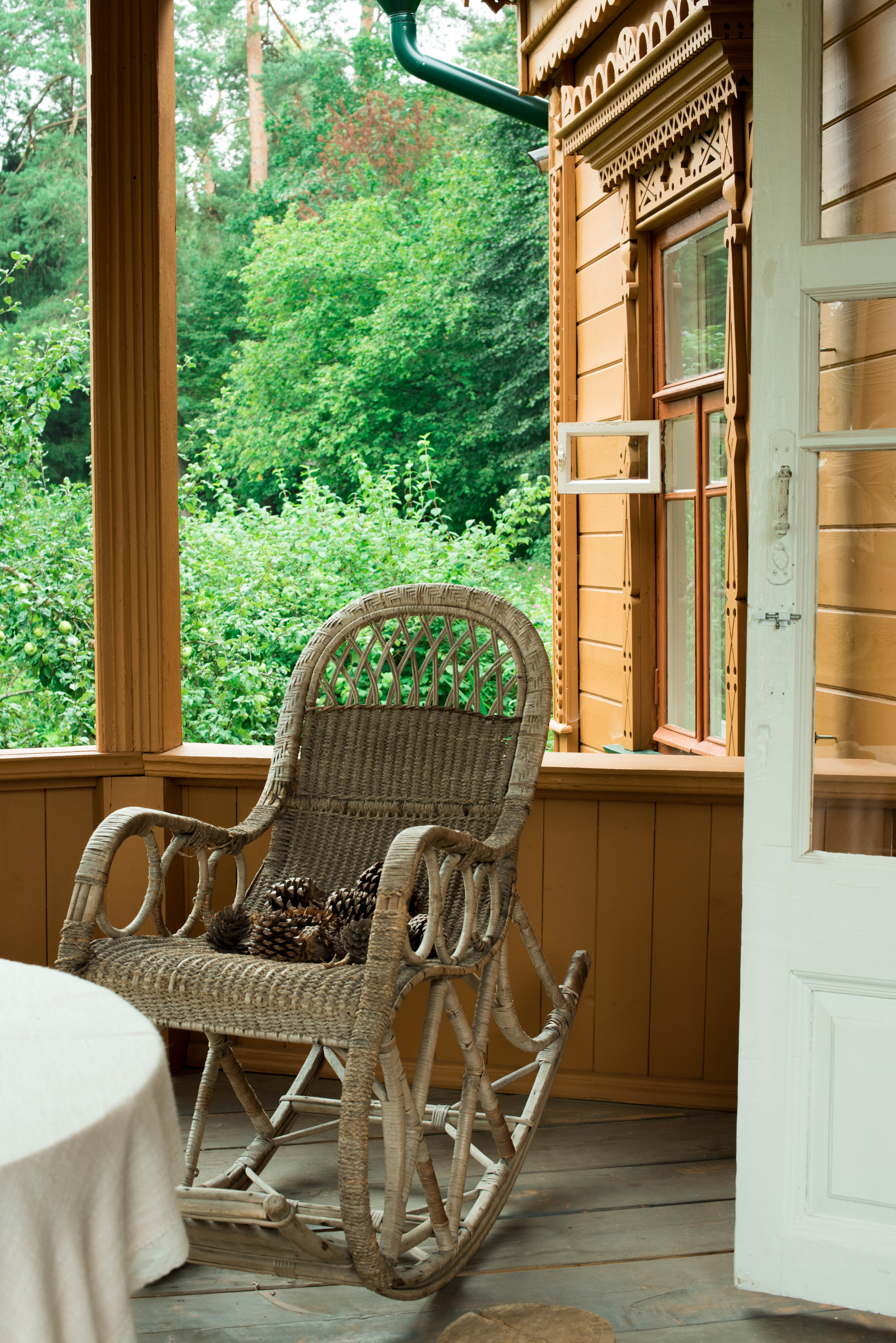 Дом-музей М.М. Пришвина, веранда (Москва и Московская область, Звенигород, деревня Дунино)